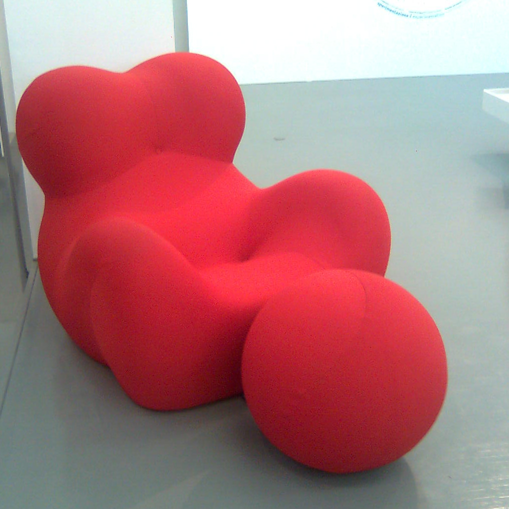 Gaetano Pesce: Poltrone UP5 e UP6 Donna, design 1969, al Triennale Design Museum di Milano nel 2009